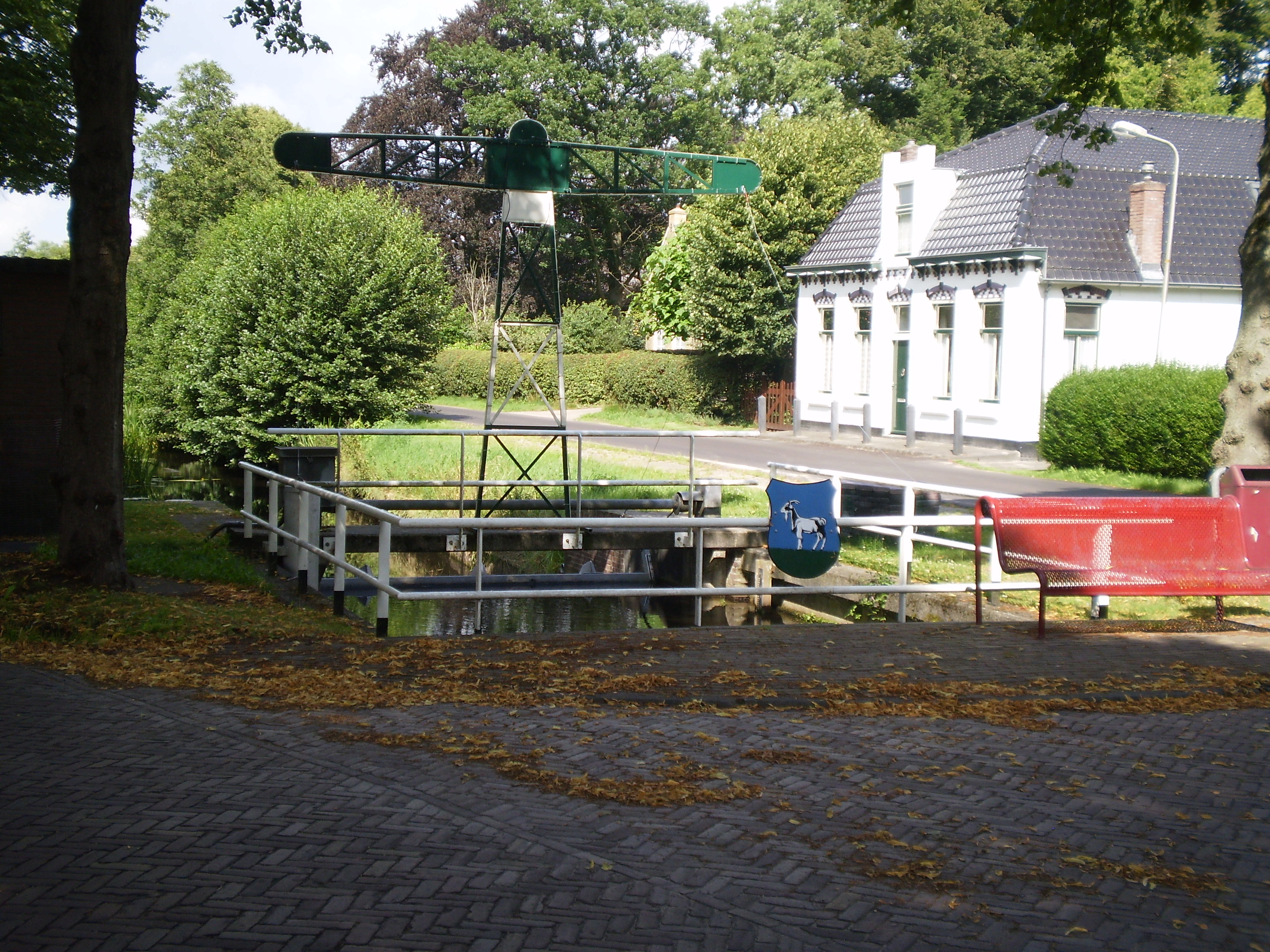 Ofbyld oanbean troch Swarte Kees op 30 july 2009